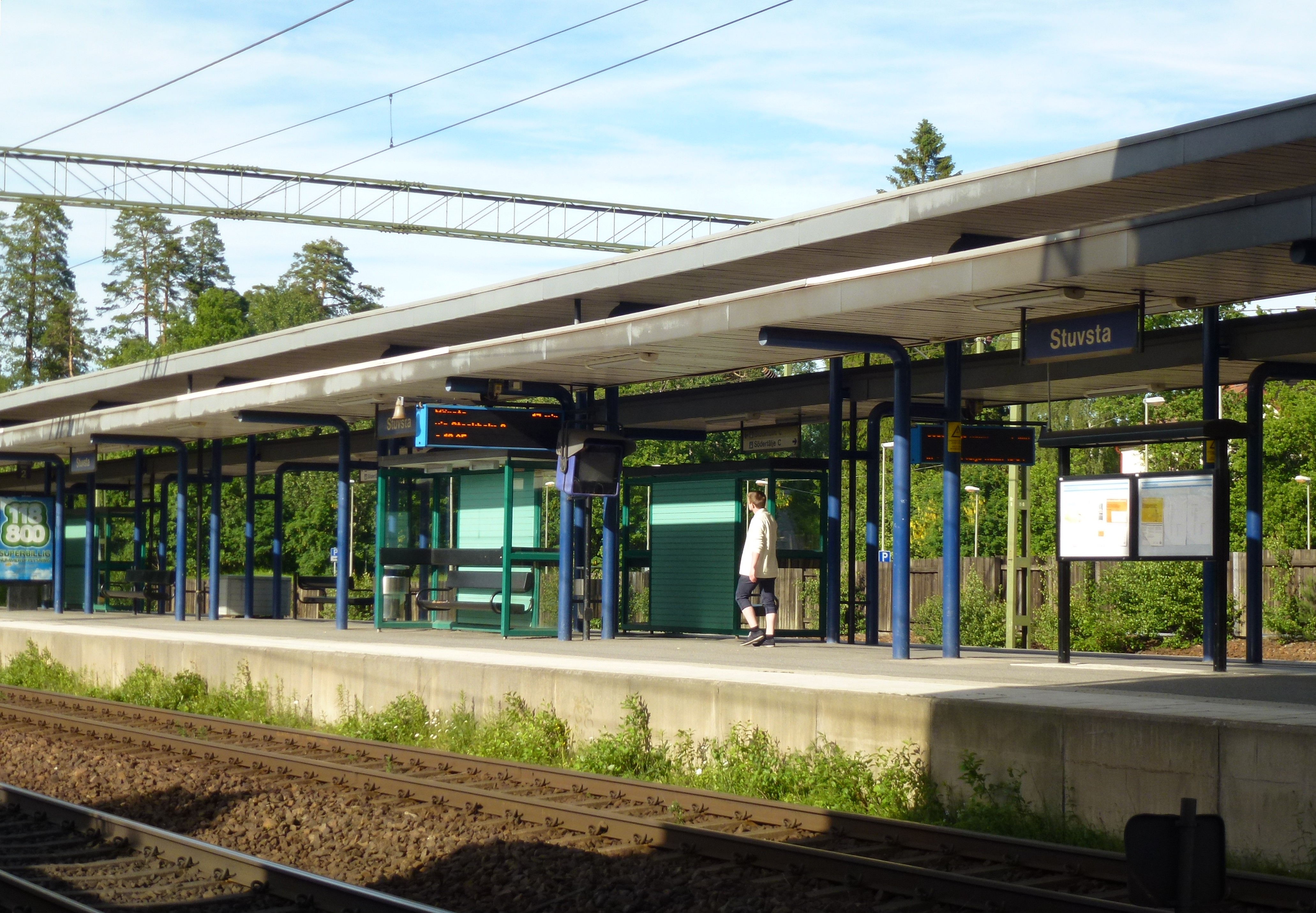 Stuvsta pendeltågstation